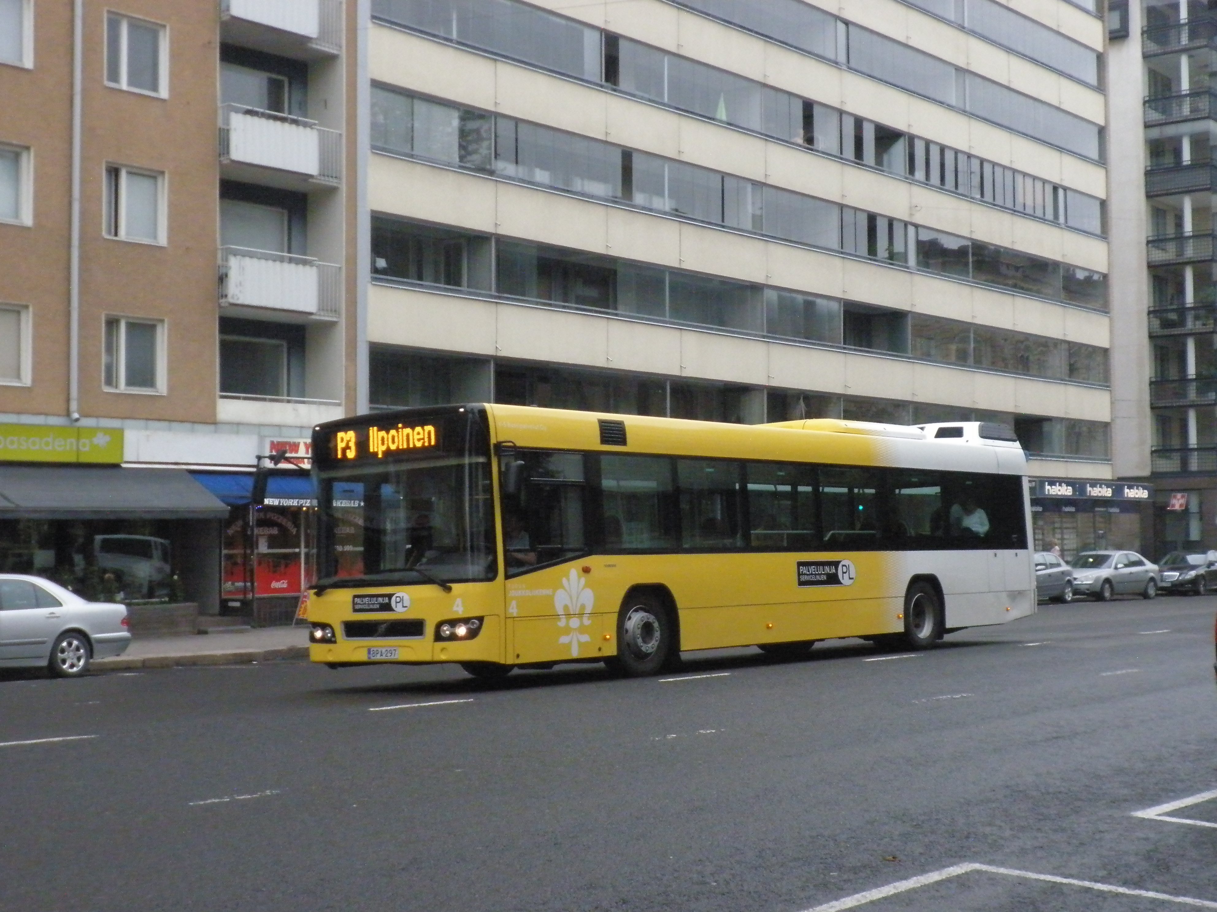 V-S Bussipalveluiden Volvo 7700 linjalla P3